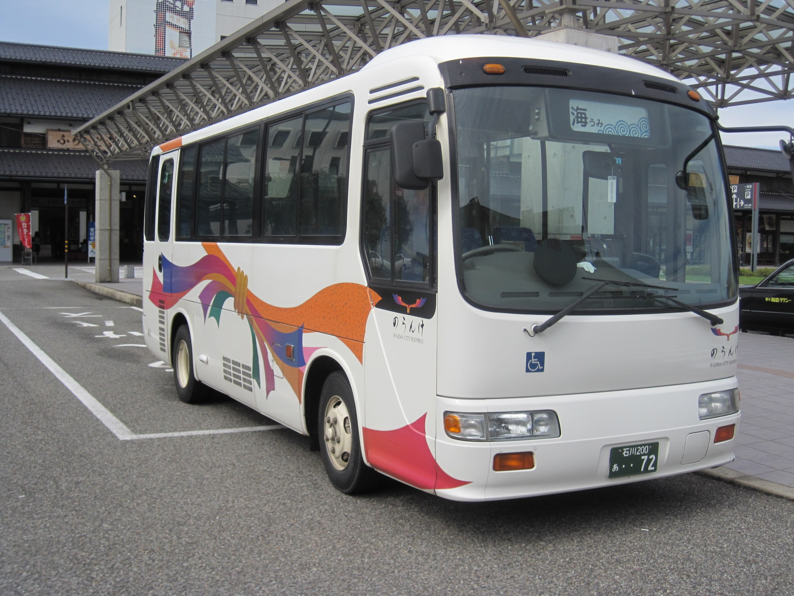 石川県輪島市のコミュニティバス「のらんけバス」（日野リエッセ）。北鉄奥能登バスに運行を委託している。